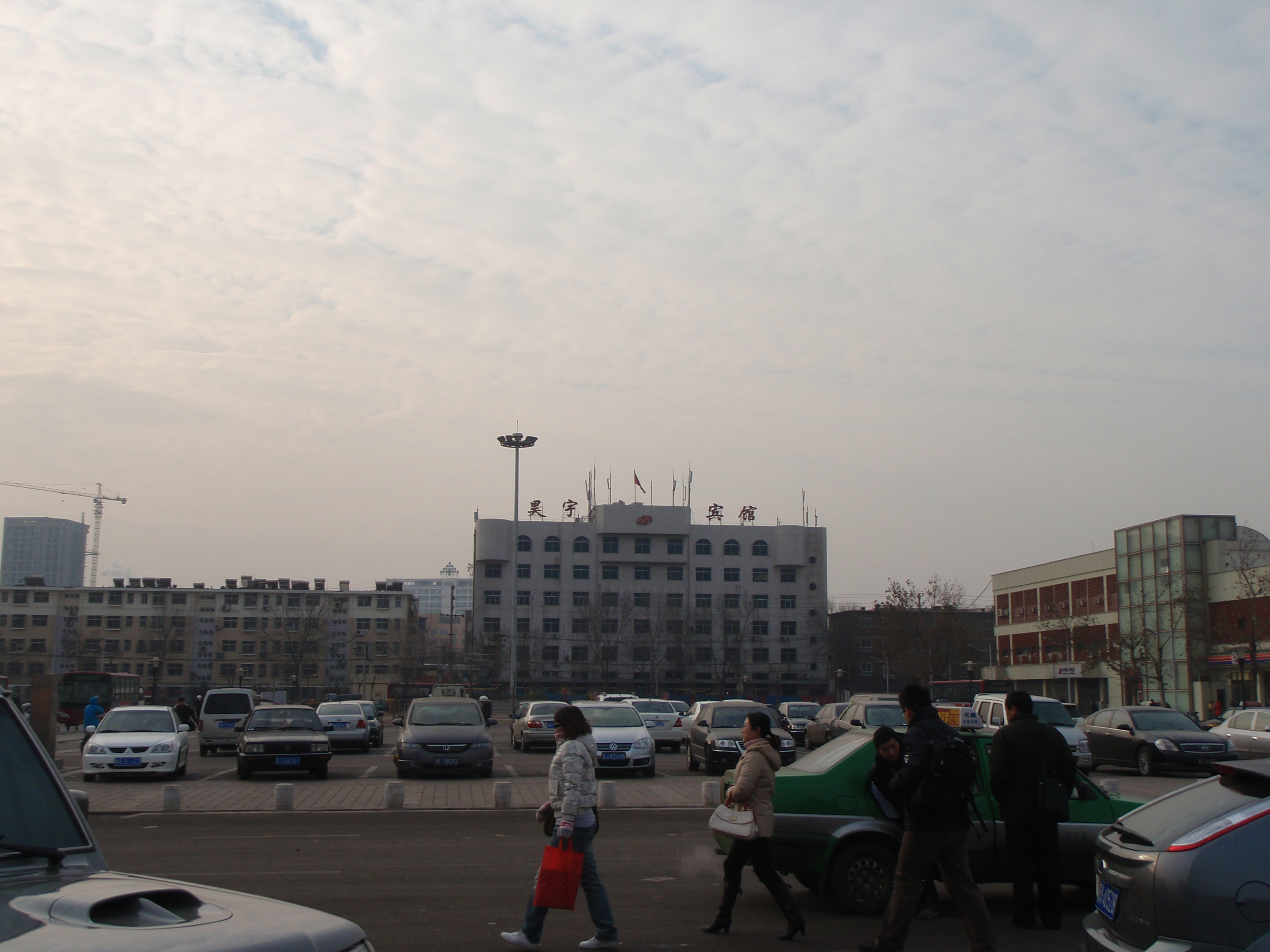 石家庄北站的昊宇宾馆